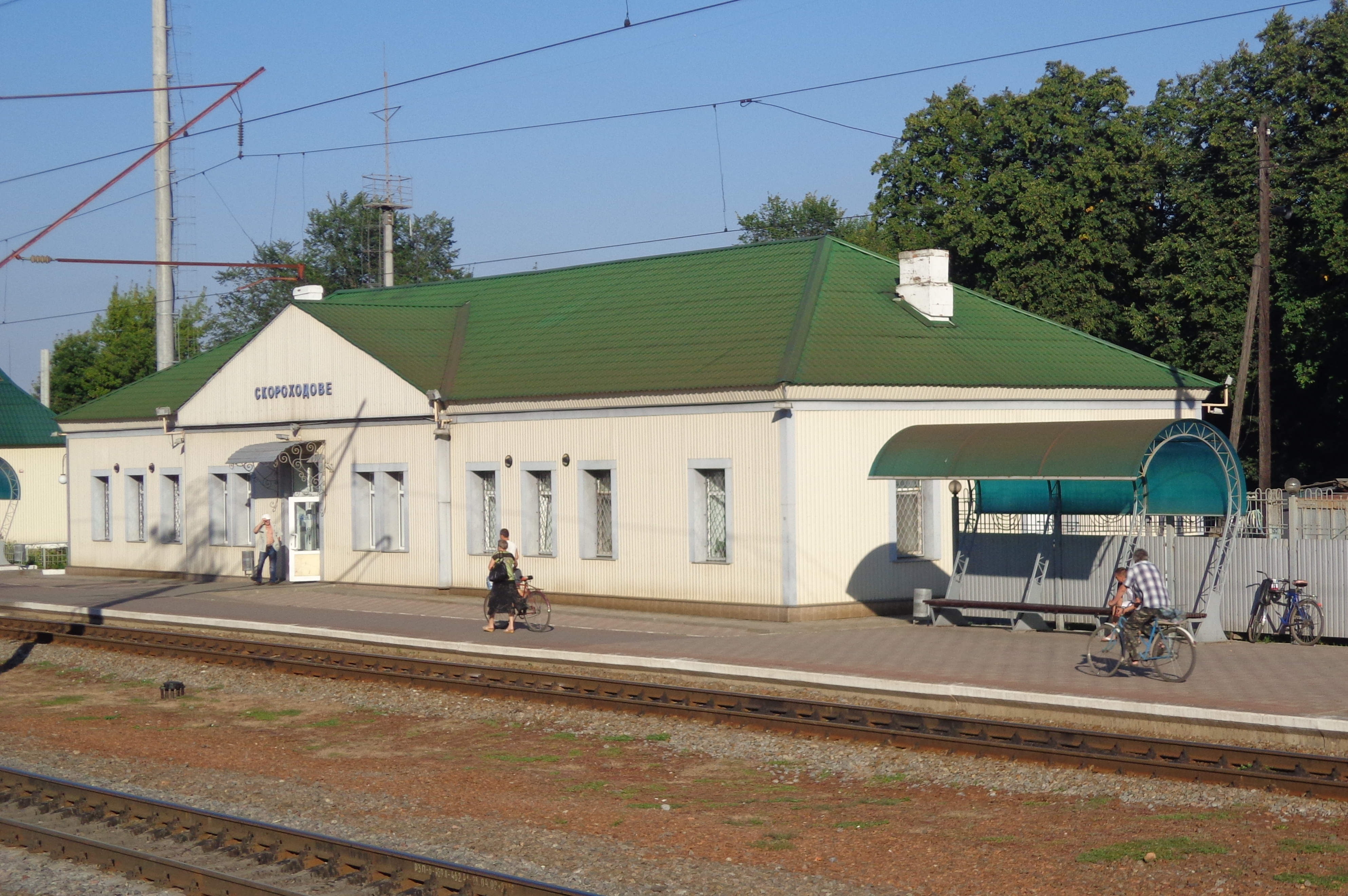 Станция Скороходово, Полтавская область, Украина, ветка Харьков-Полтава.